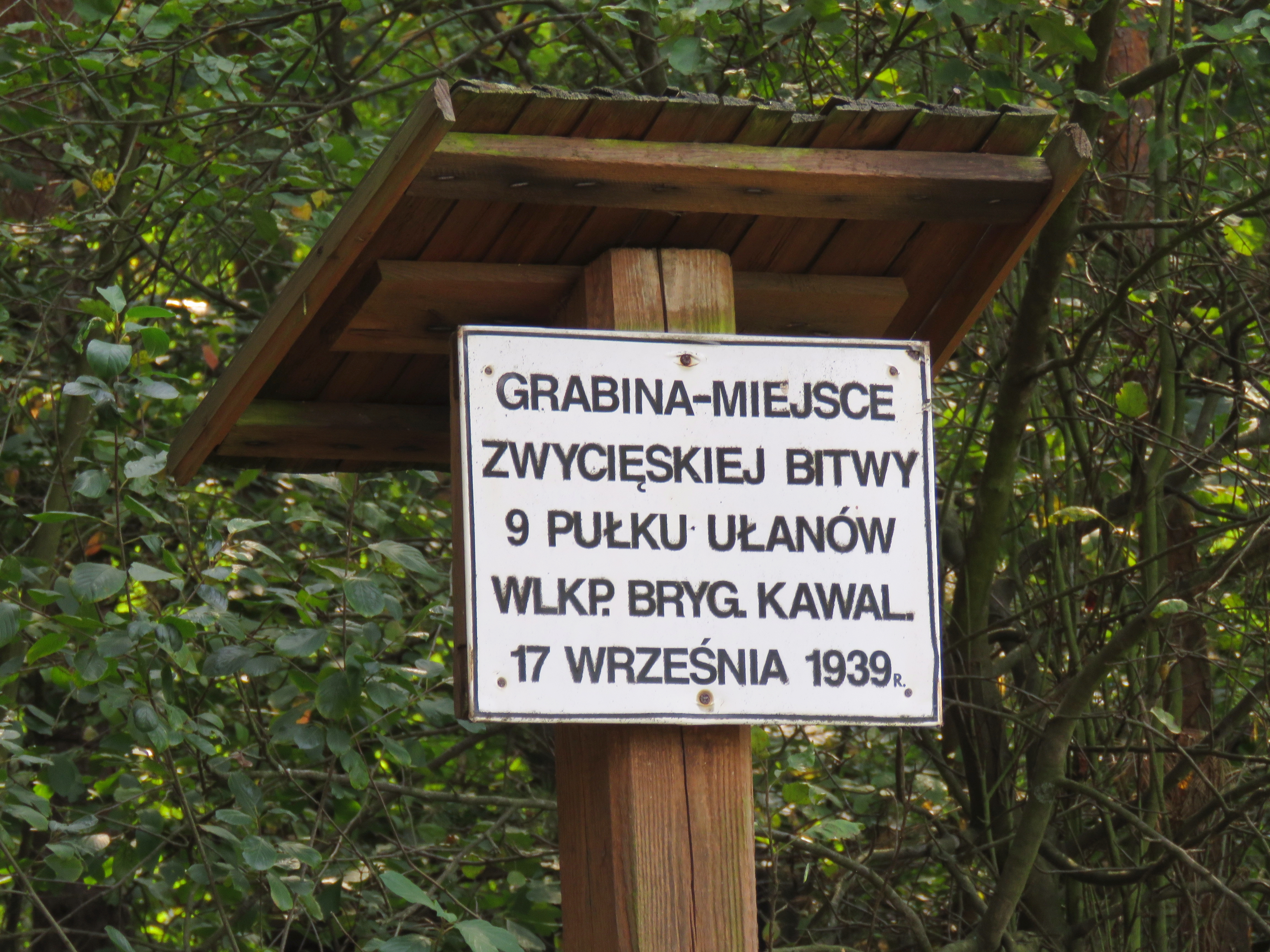 Grabina, gm.Leszno